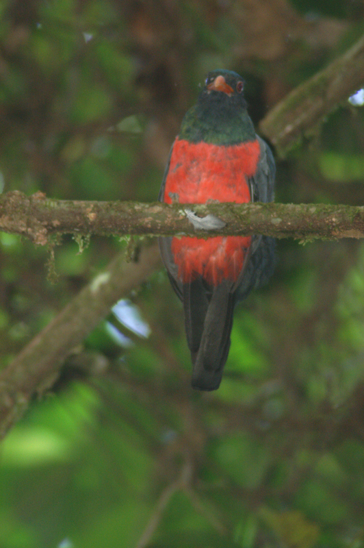 Massena Trogon (Trogon massena)